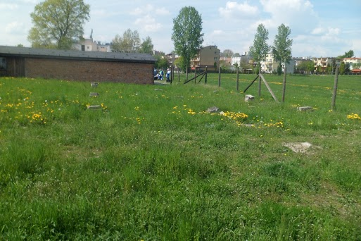 Foto saca en un campo de concentración